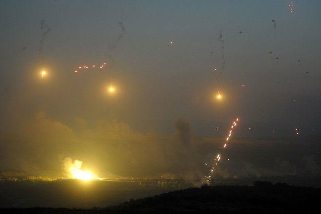 Розыгрыш тактического эпизода КШУ Кавказ-2012